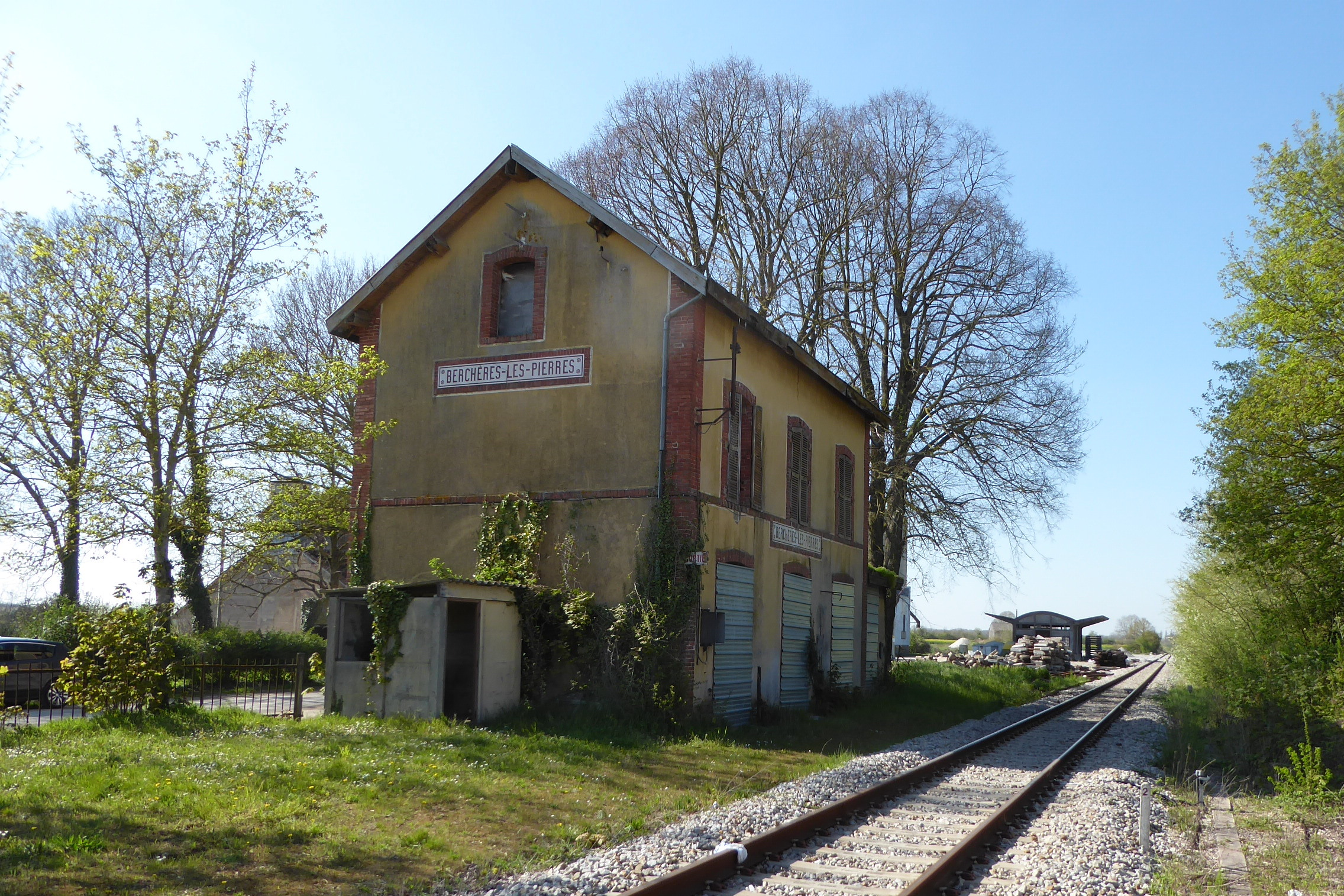 Gare de Berchères-les-Pierres, Eure-et-Loir (France).